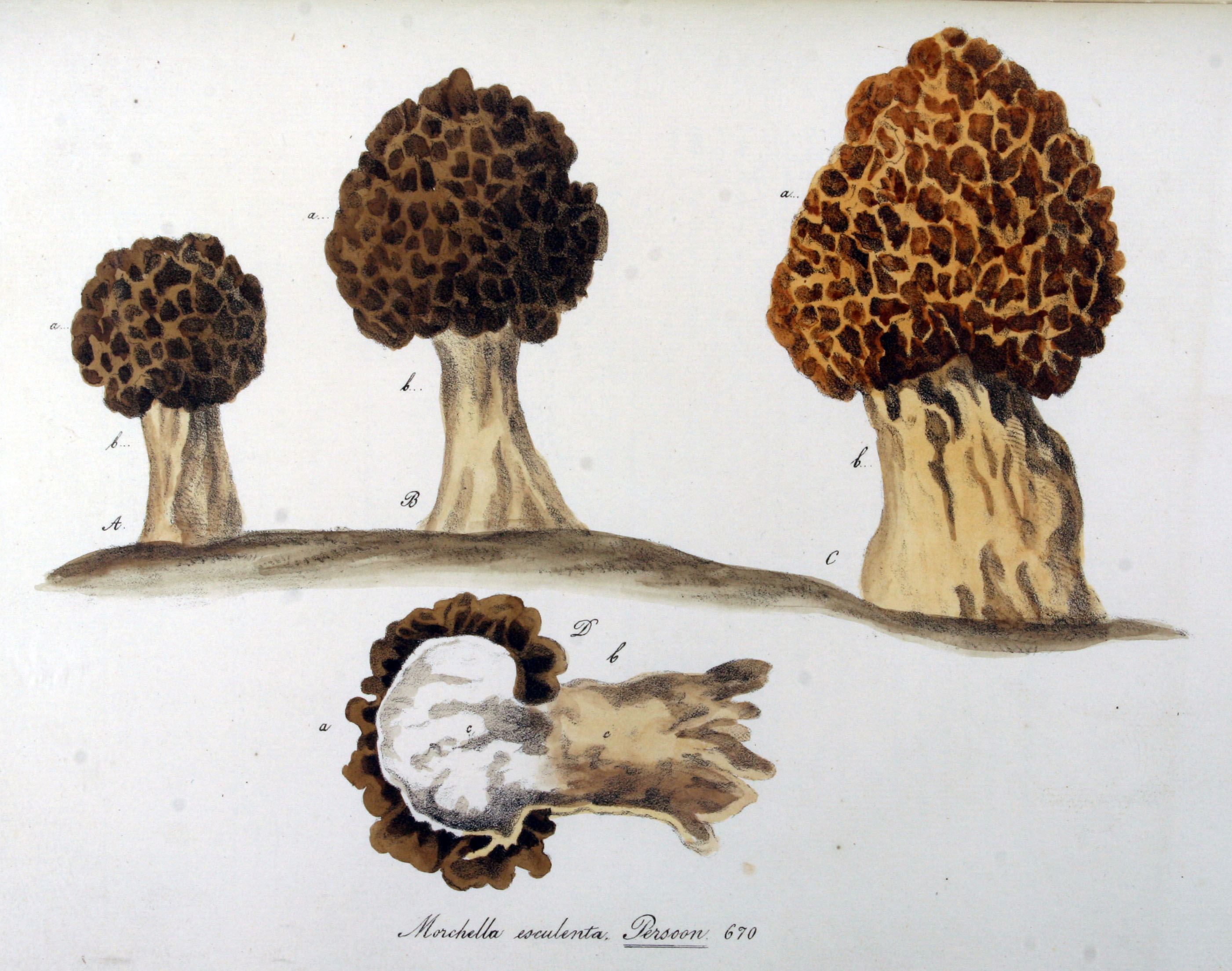 Morchella esculenta